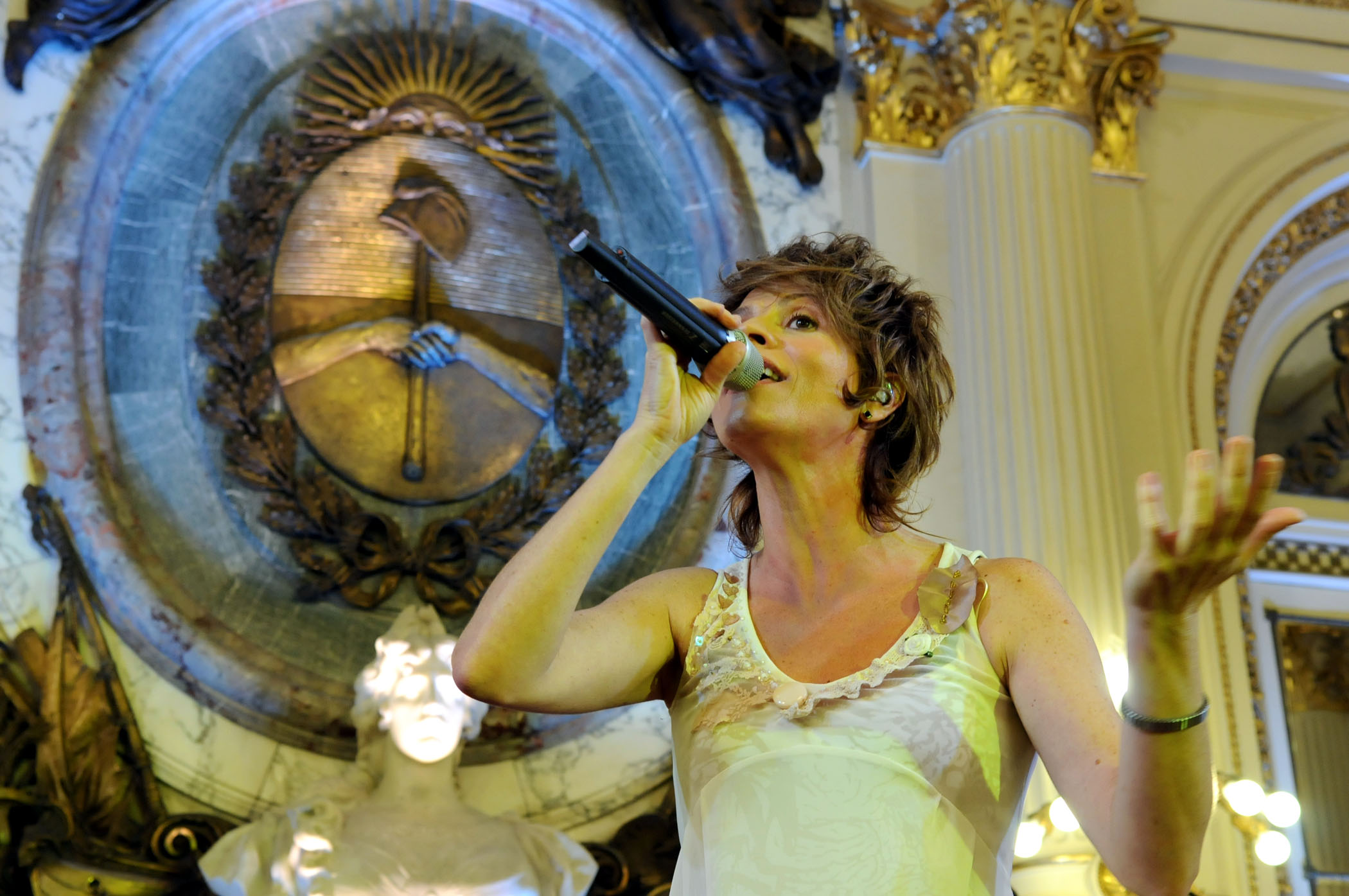 La cantante Marcela Morelo brindó un recital en la Casa de Gobierno en el marco del ciclo "Música en el Salón Blanco".